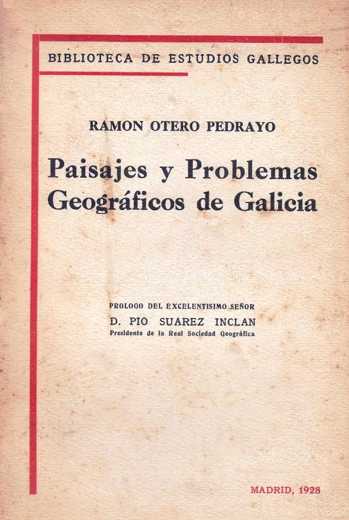 Paisajes y problemas geográficos de Galicia.